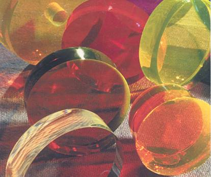 Echantillons laser polis de 50 mm de diamètre (Echantillons F. Chaput, CNRS-Ecole Polytechnique) Auteur : EQUILBEY Serge. Licence GFDL Institut d'Optique